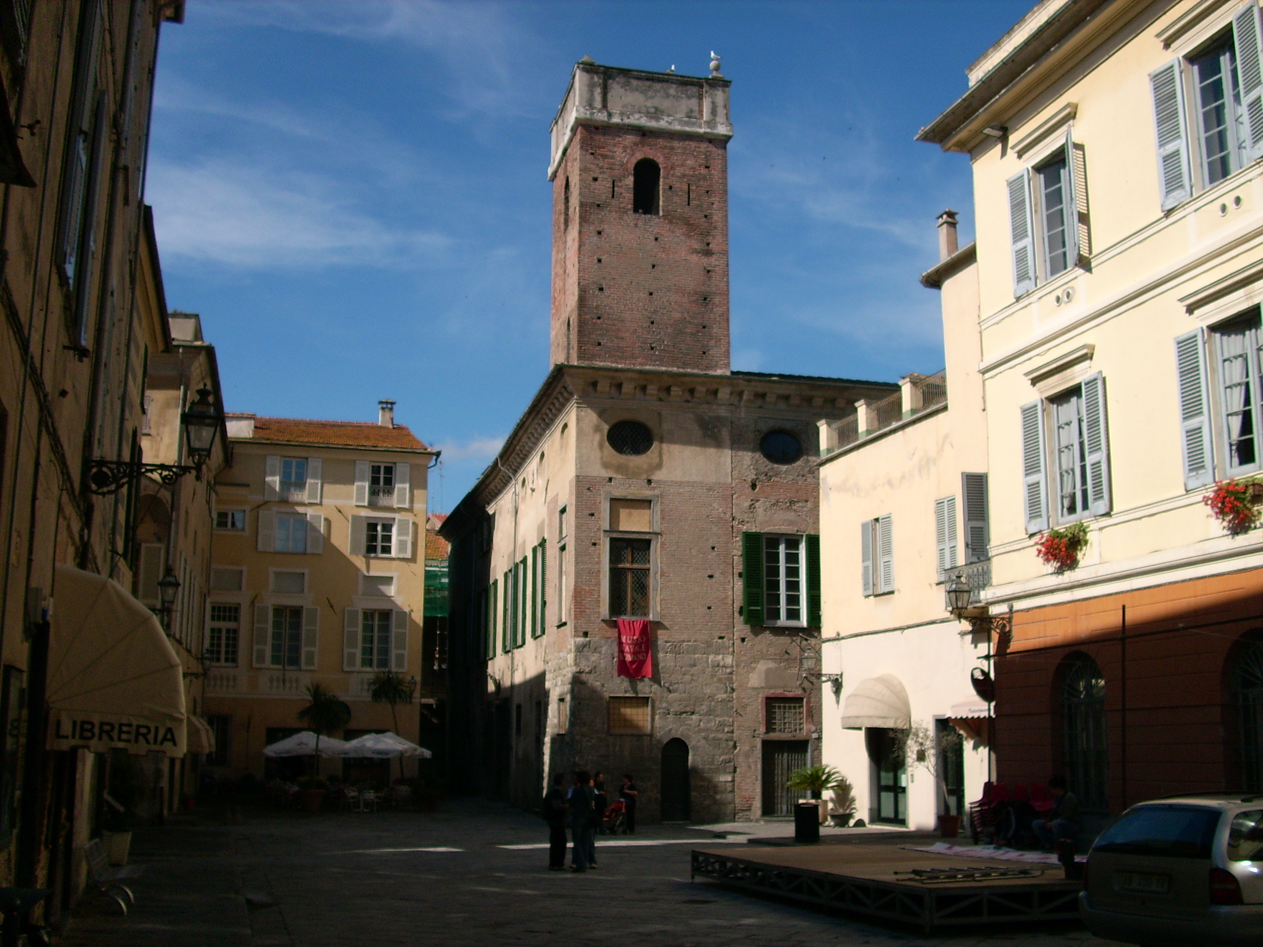 Museo Navale Romano di Albenga, Liguria, Italia